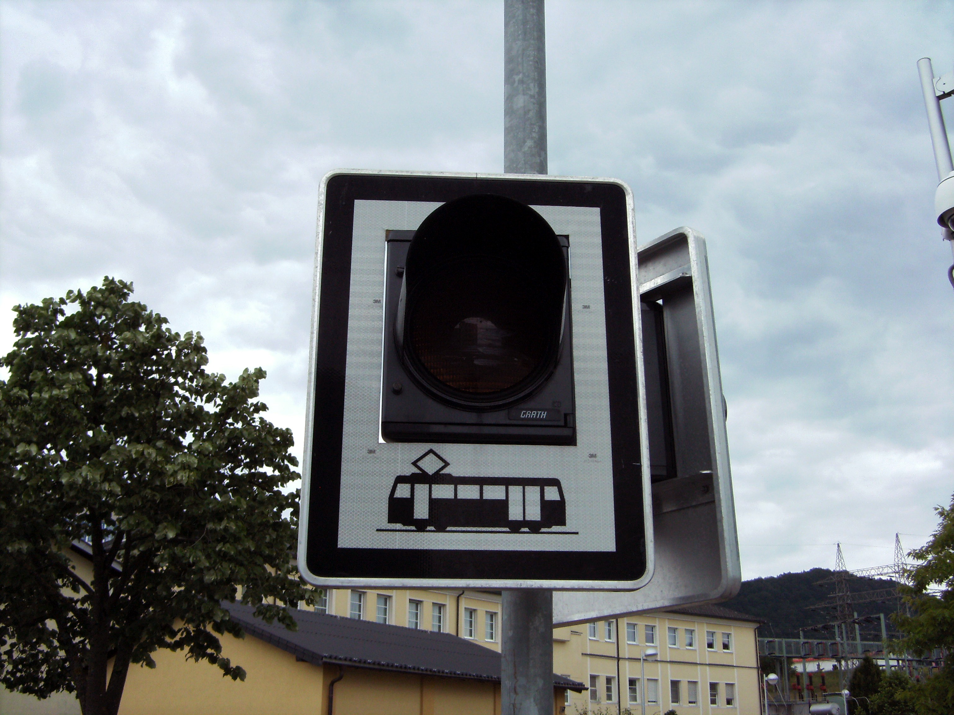 Sicherungsanlage der Straßenbahn Gmunden